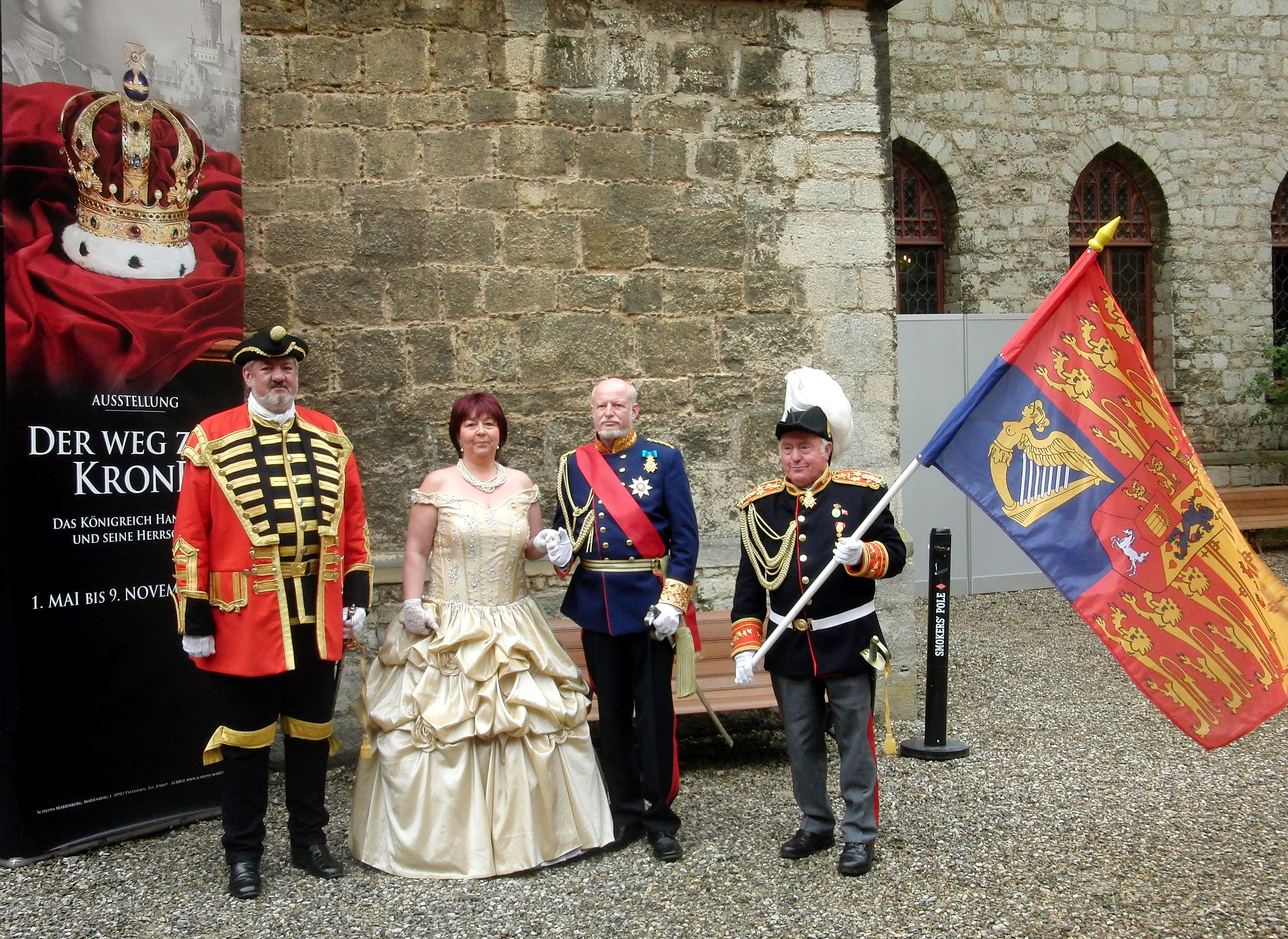 Dieses Bild, aufgenommen im Innenhof von Schloss Marienburg am Tag der Eröffnung der Ausstellung "Der Weg zur Krone. Das Königreich Hannover und seine Herrscher , wurde hochgeladen im Wikipedia-Büro Hannover: "General-Adjudant v. Bülow" (Jörg Weichelt), Königin Marie Sophie von Sachsen-Altenburg (Petra Deppe), König Georg V. a.k.a. Claus-Peter Enders sowie General-Major von Heimberg (Walter Geissler) vom Verein Herrschafts´Zeiten - Denk´mal Kultur e.V. ...